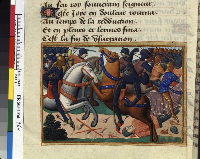 Bataille de Chappes (1431) (Vigiles de Charles VII, Manuscrit Français 5054, fol. 76v)